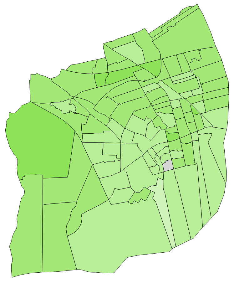 顏色對照表